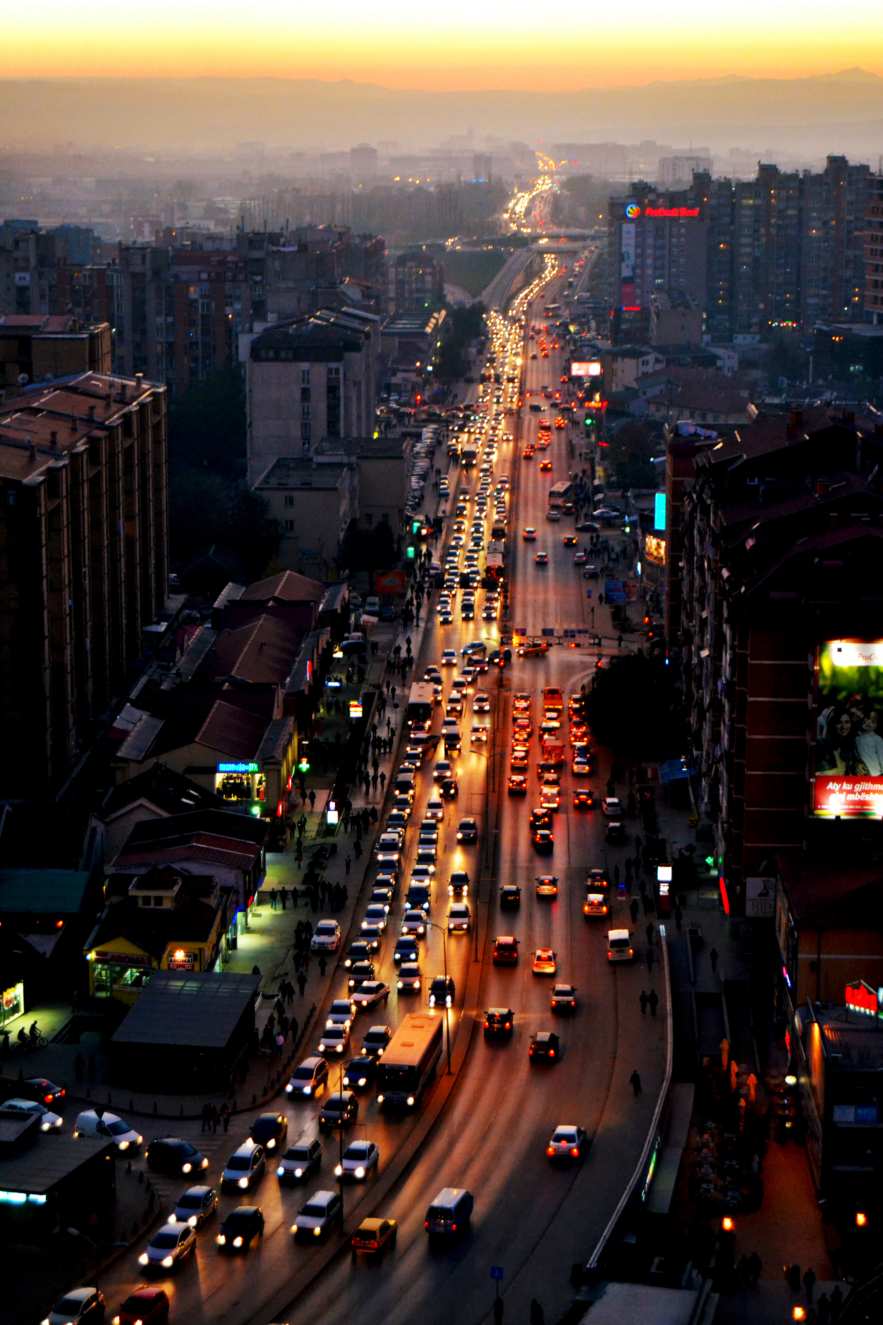 PRISHTINA: TRAFIKU I PRISHTINES NE MBREMJE